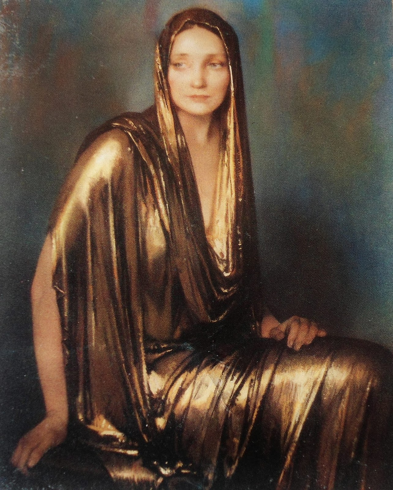 Картины художника Firmin Baes (1874-1943)